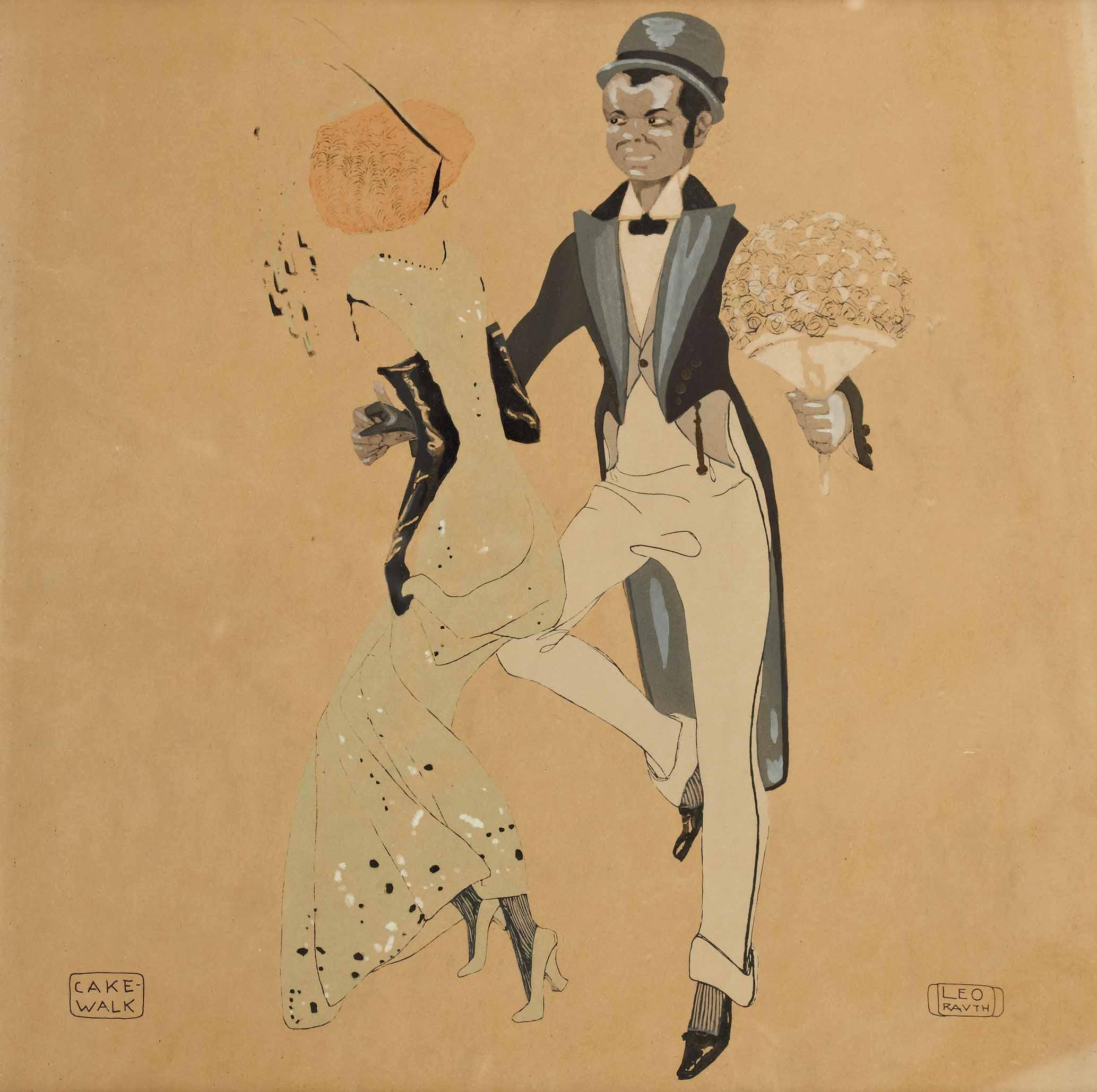 "Cake-Walk", rechts unten signiert Leo Rauth, Mischtechnik auf Papier, Blattgröße ca. 37 x 36 cm